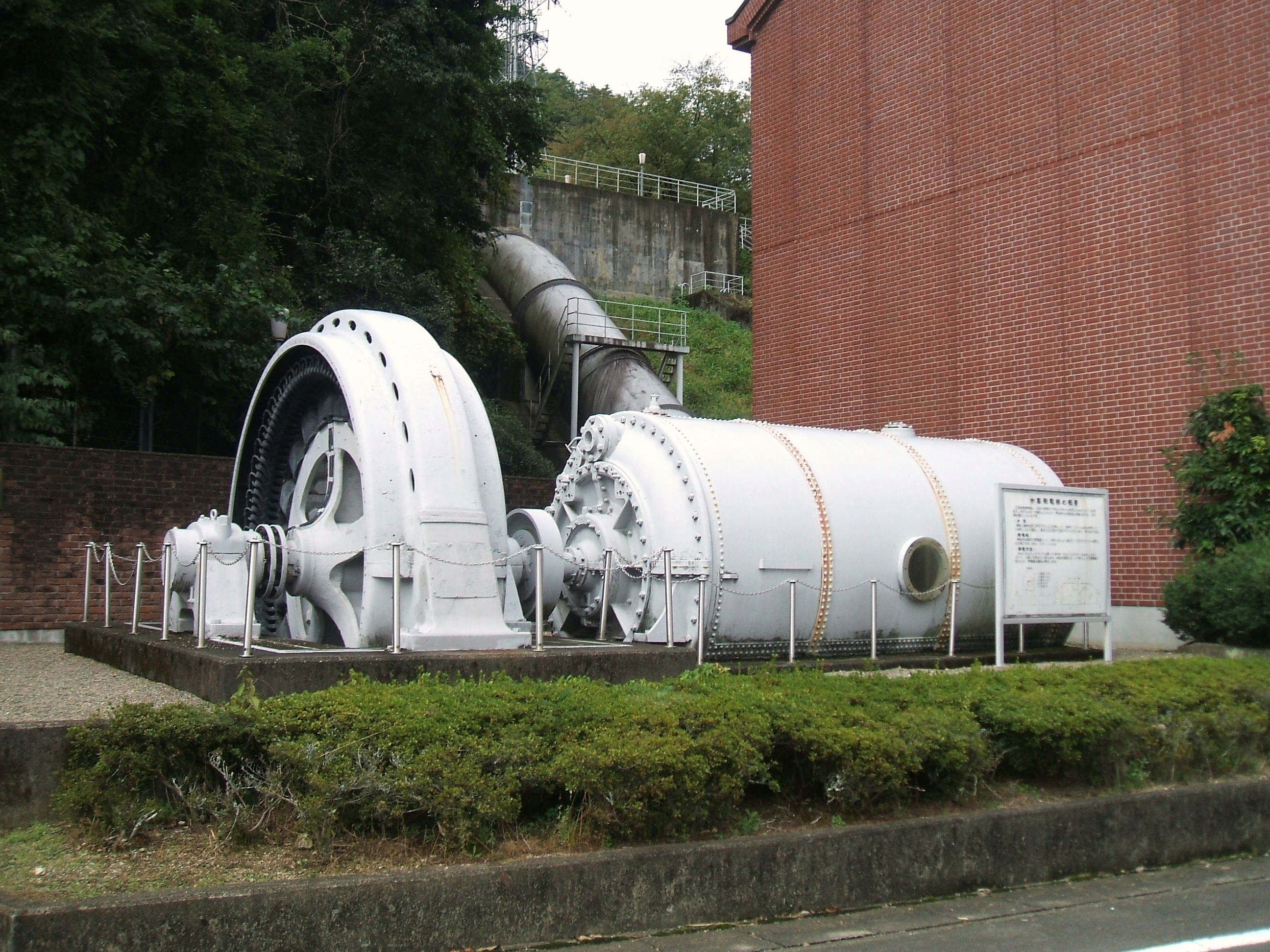 展示されている水車と発電機。